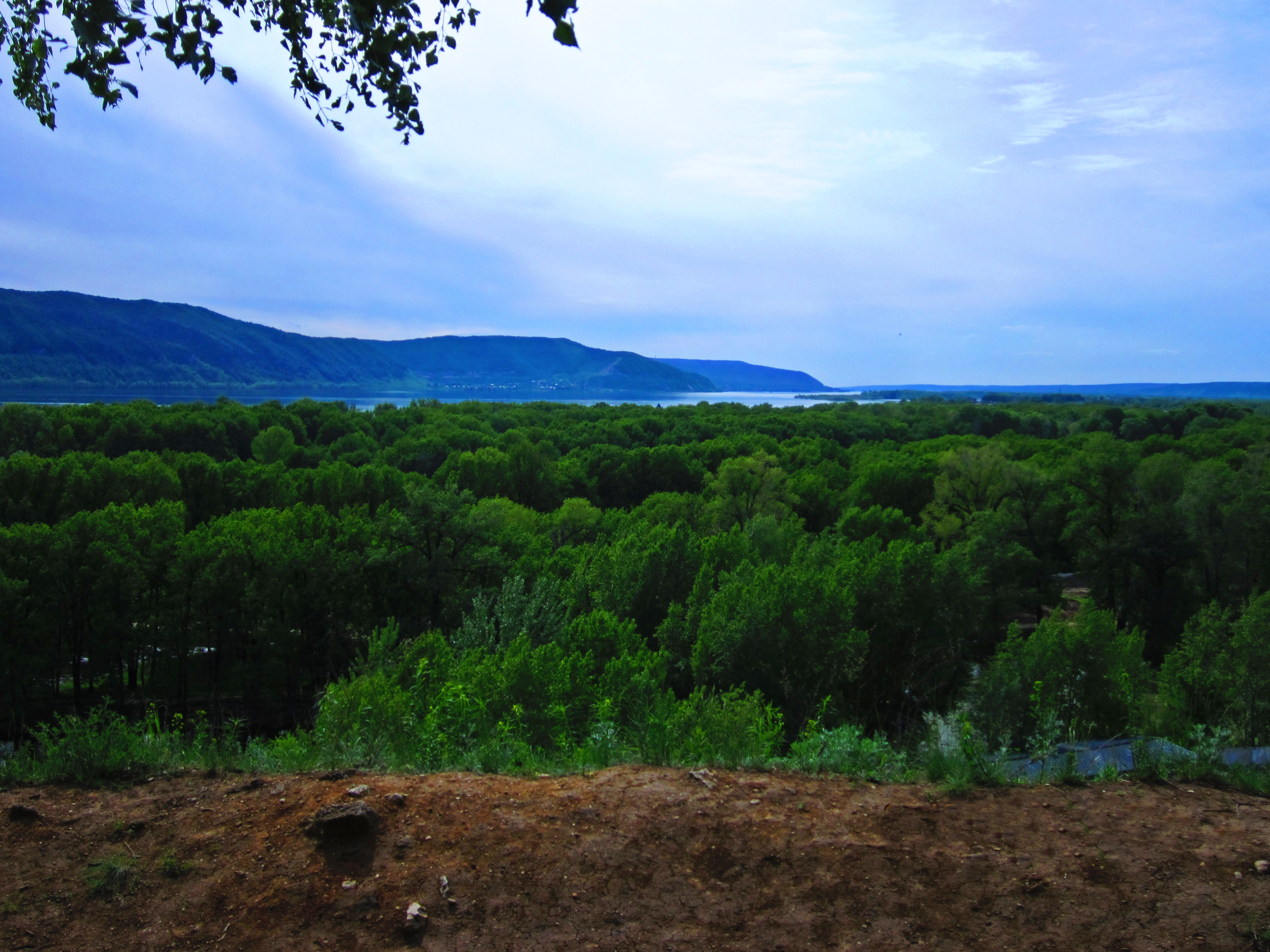 Царев курган: Волжский, Красноярский район, Самарская область This image is related to the protected area of Russia number 6310440